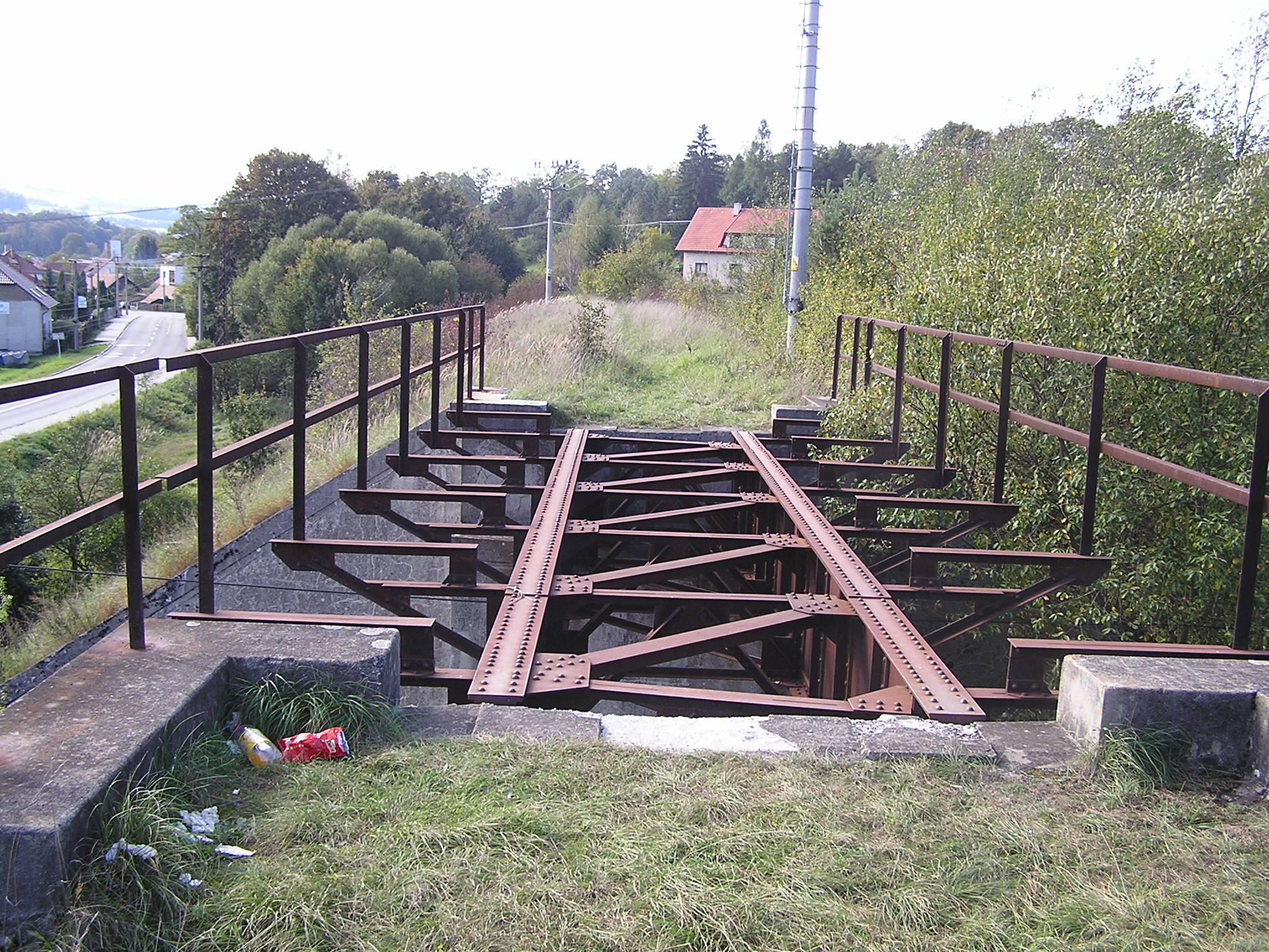 Most na nedostavěné trati Vizovice-Vsetín